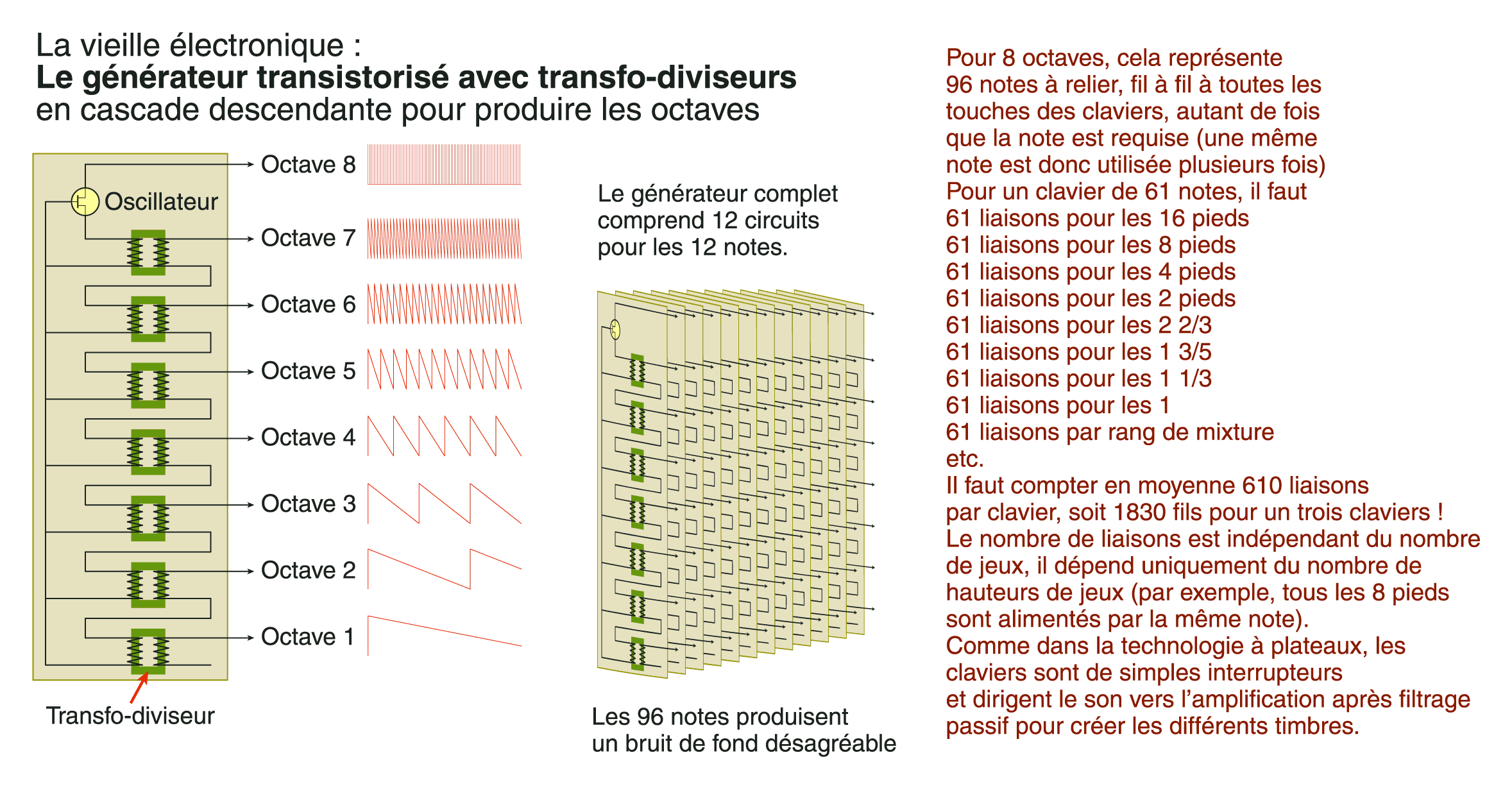 Schéma montrant le principe de fonctionnement de l'orgue électronique à oscillateurs transistorisés